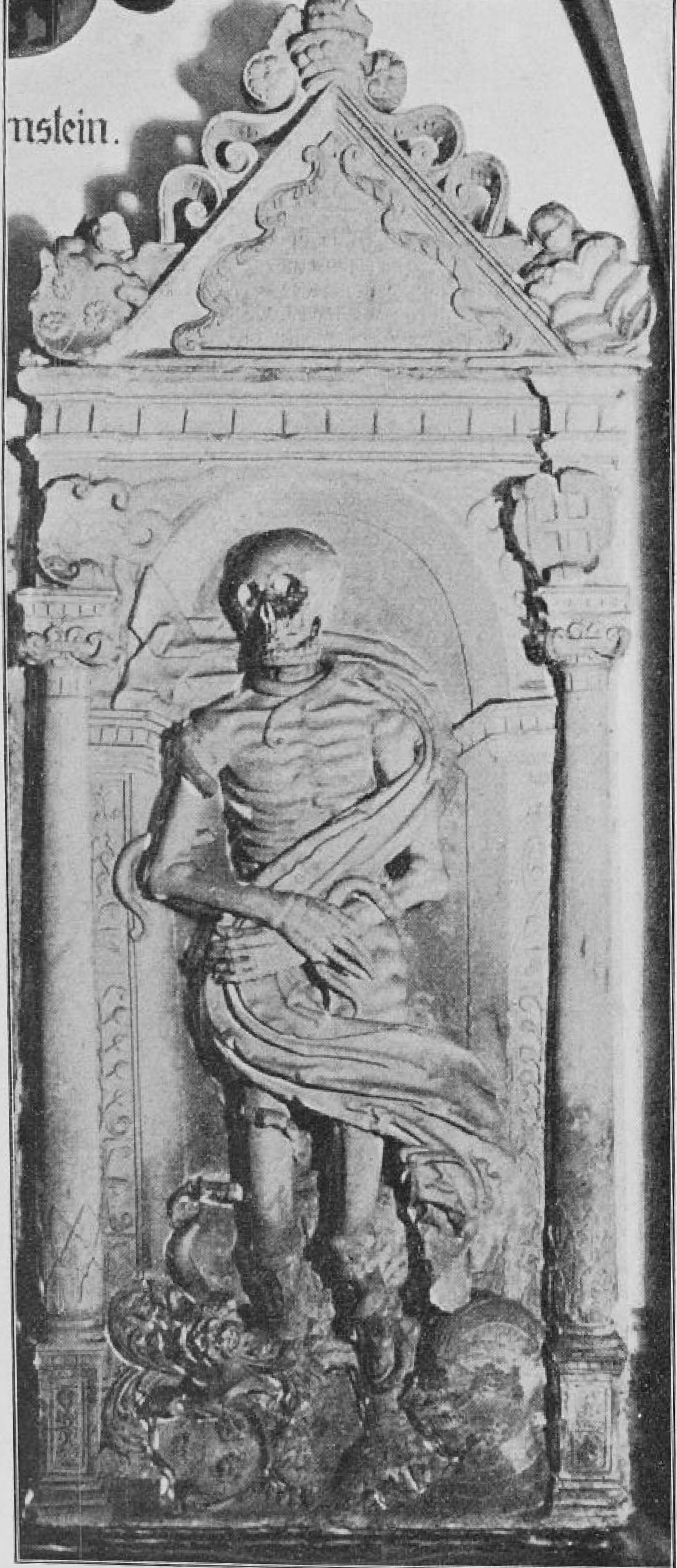 Grabmal Wolfgang_von_Schleinitz † 1523. In: Beschreibende Darstellung der älteren Bau- und Kunstdenkmäler des Königreichs Sachsen, Dresden: Meinhold: H. 39: Meißen (Stadt, Vorstädte, Afrafreiheit und Wasserburg), S. 375